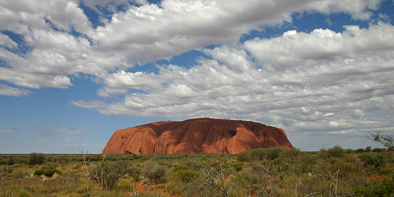 Uluru